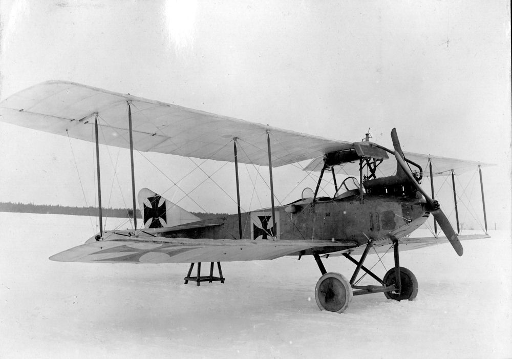 Albatros B-II im Schnee